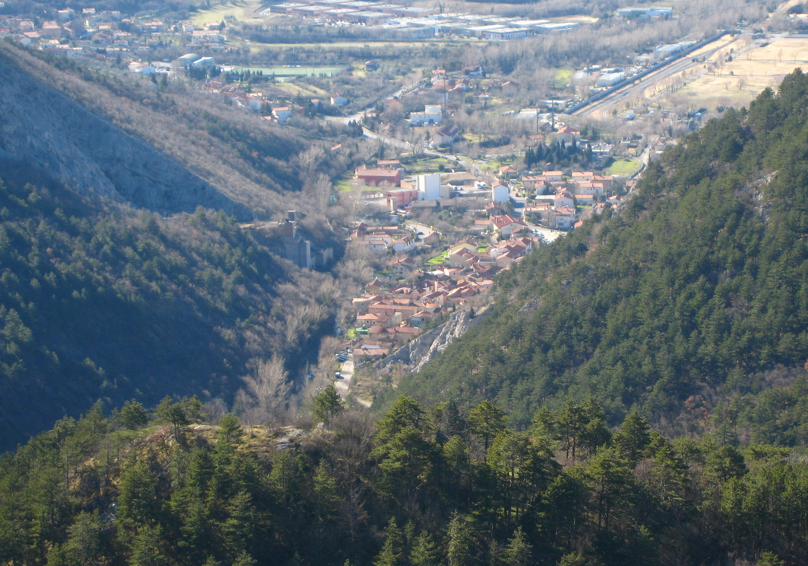 Bagnoli della Rosandra (TS)